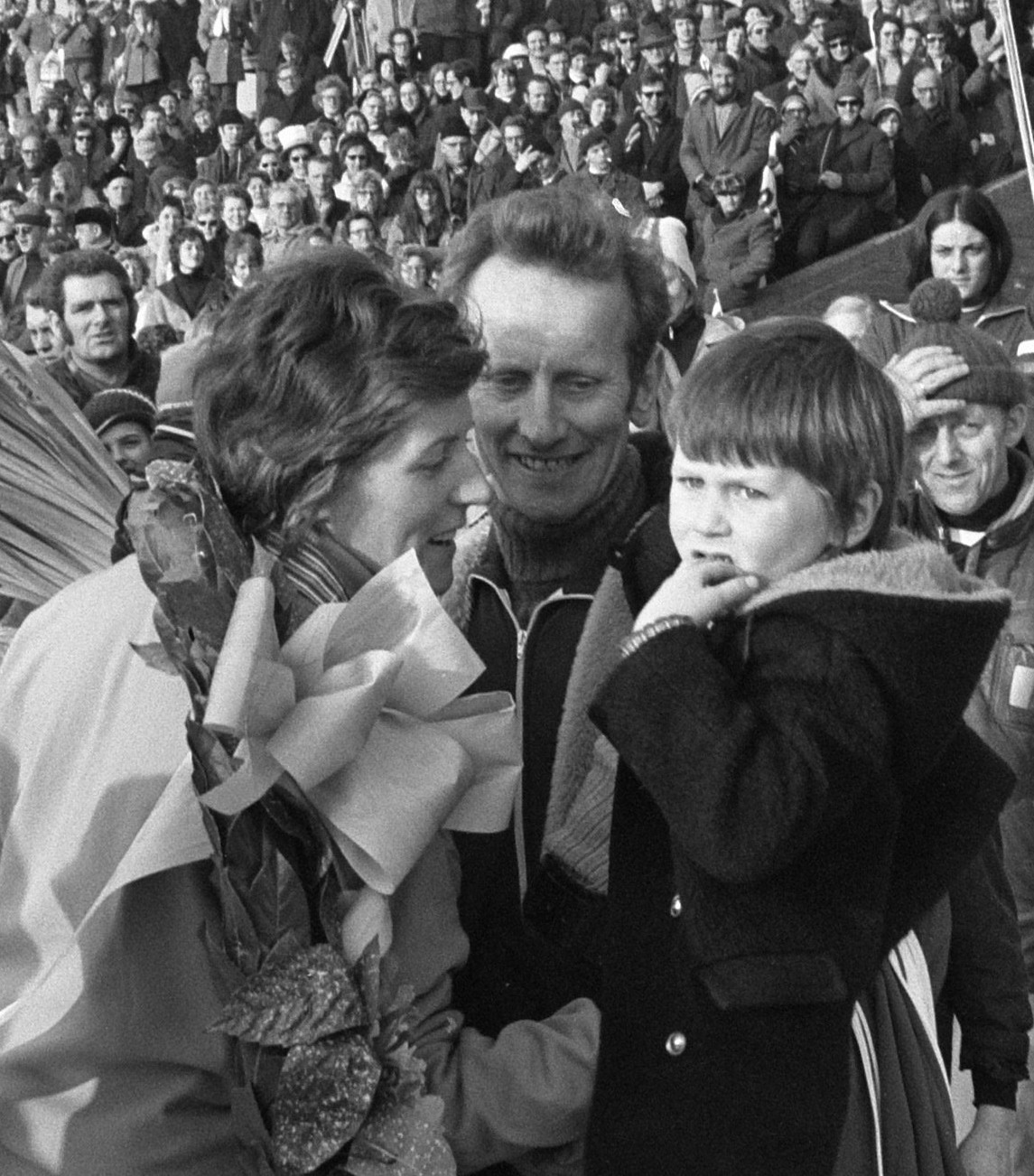 Wereldkampioenschappen schaatsen dames in Heerenveen; Atje bij man en kinderen